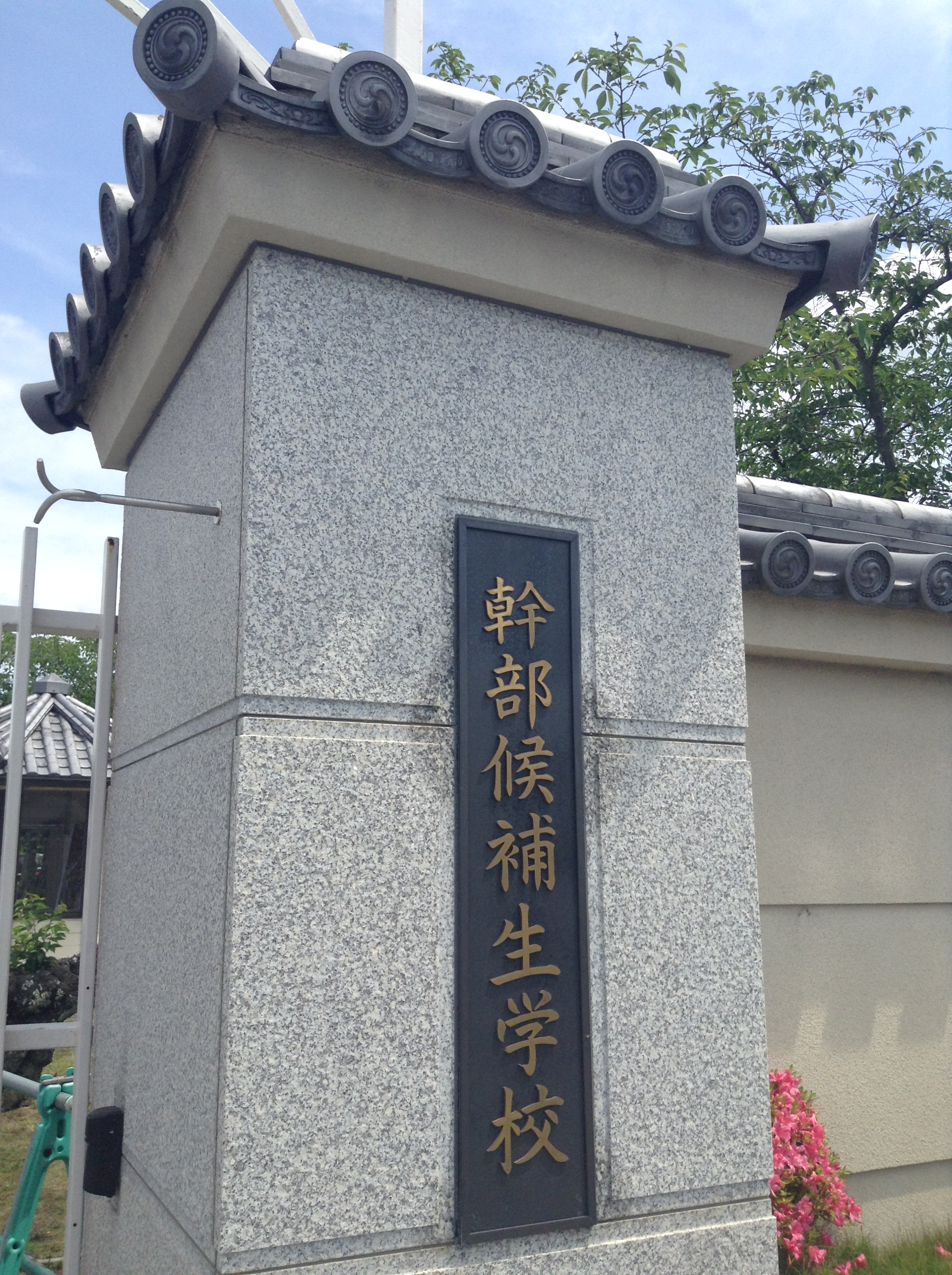 航空自衛隊幹部候補生学校の看板